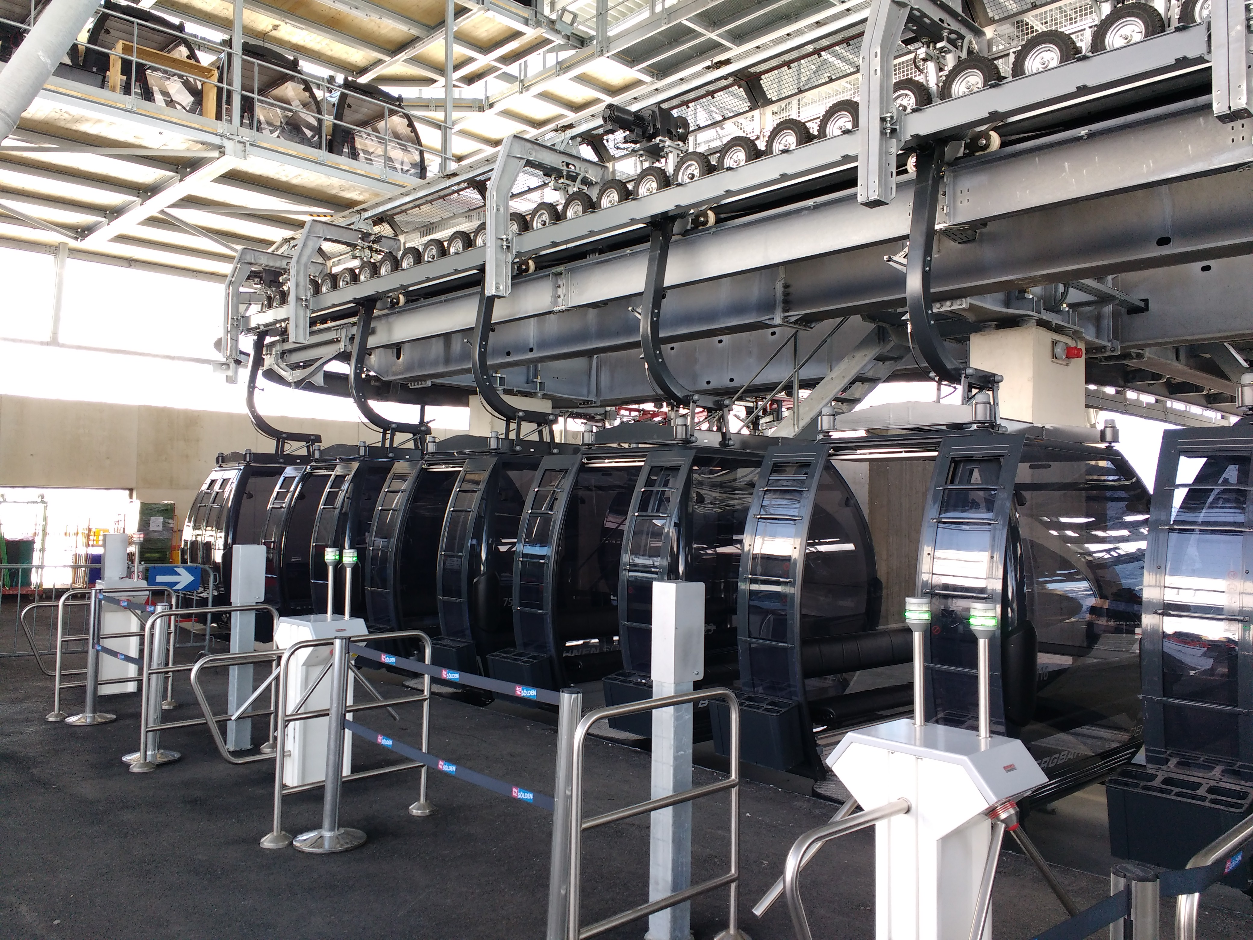 Gondeln in der Bergstation der neuen Giggijochbahn, Bj. 2016